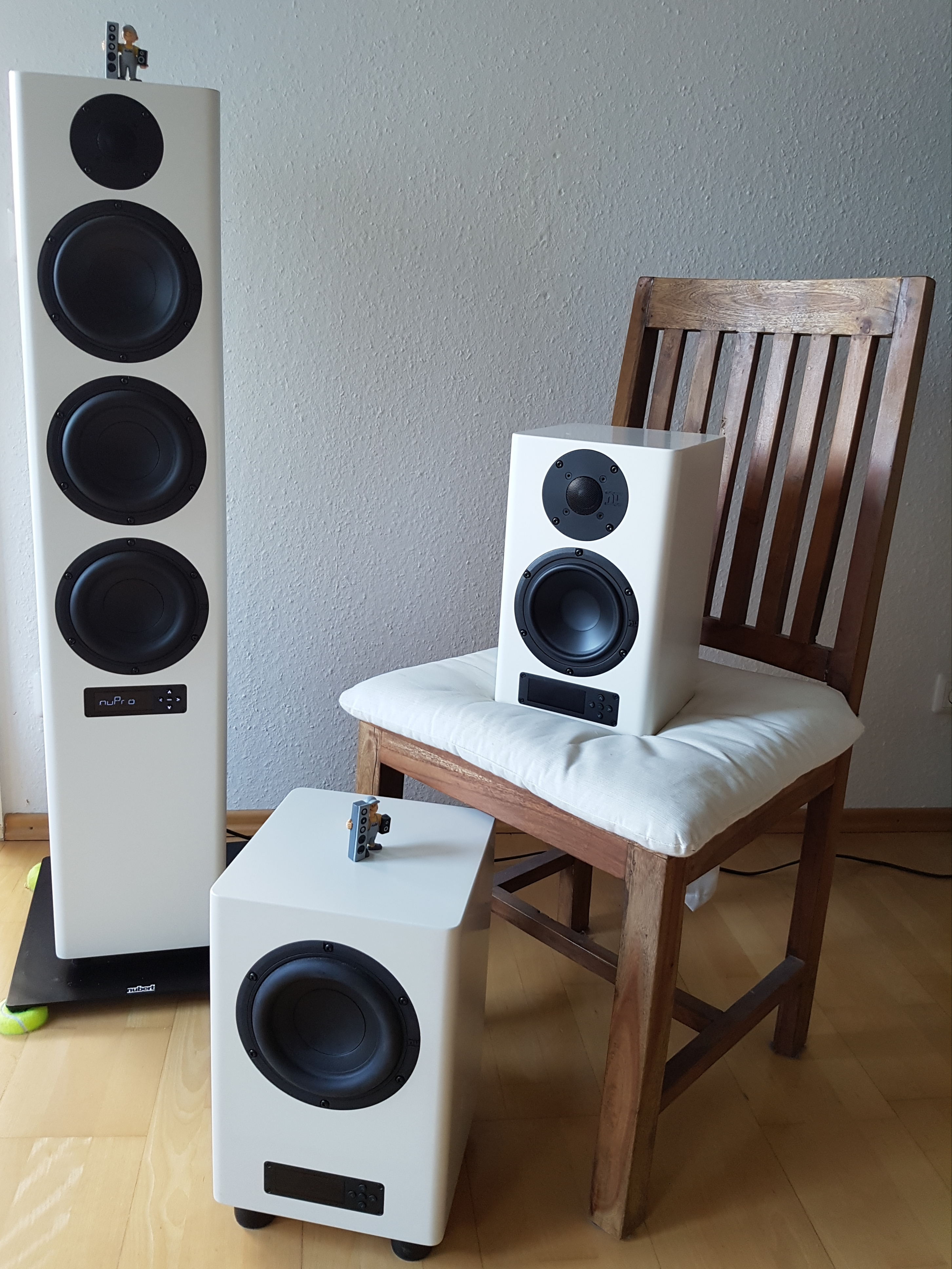 Drei Aktivboxen der Firma Nubert electronic